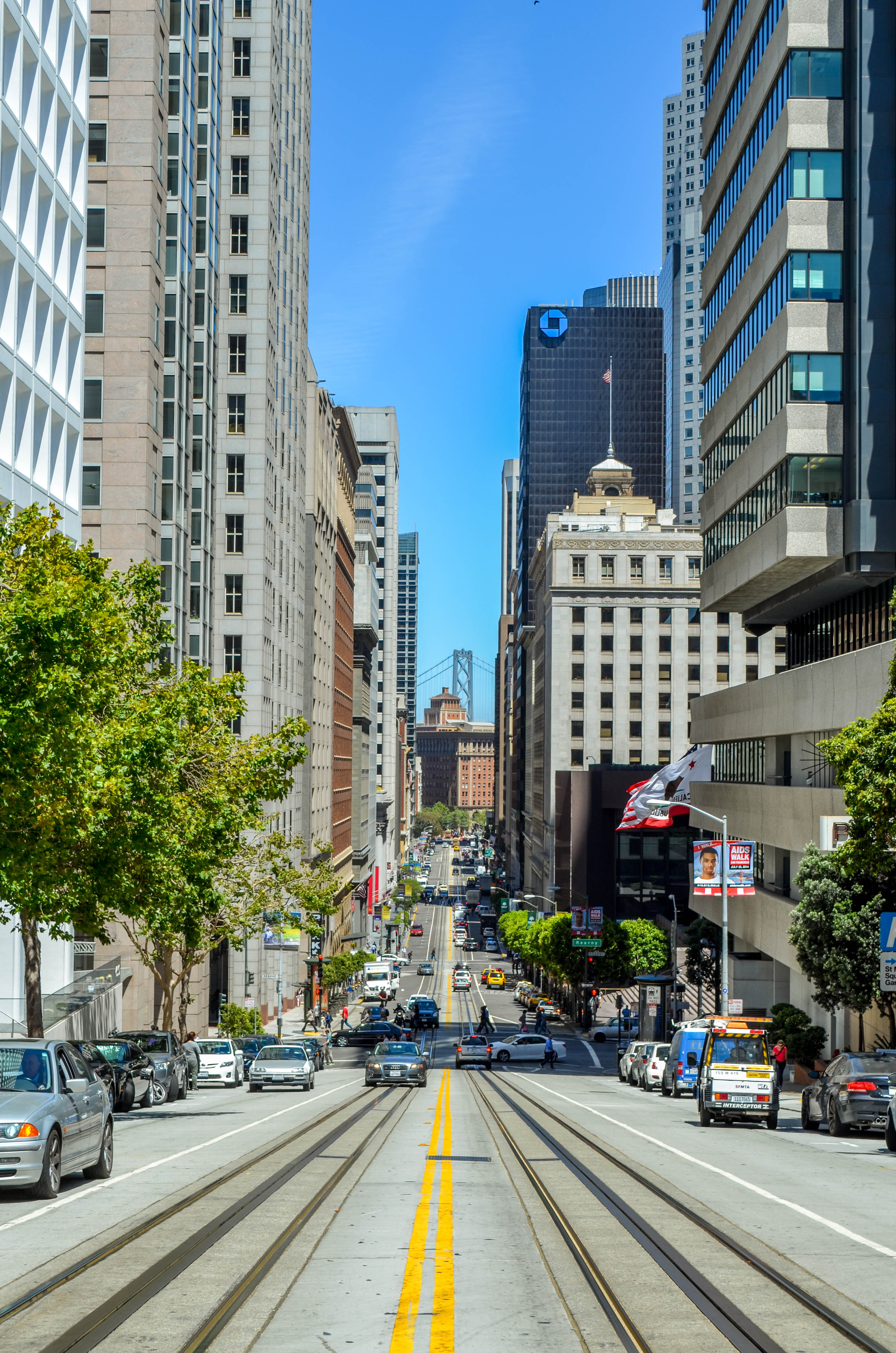 San Francisco (3157)